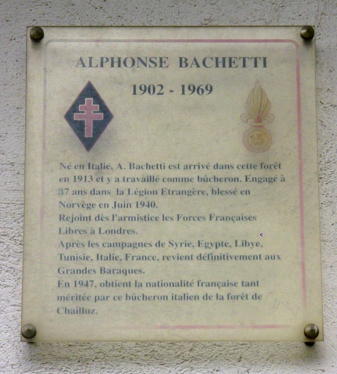 Plaque commémorative d'Alphonse Bachetti située aux grandes Baraques de la forêt de Chailluz, dans la ville de Besançon (Doubs, France).